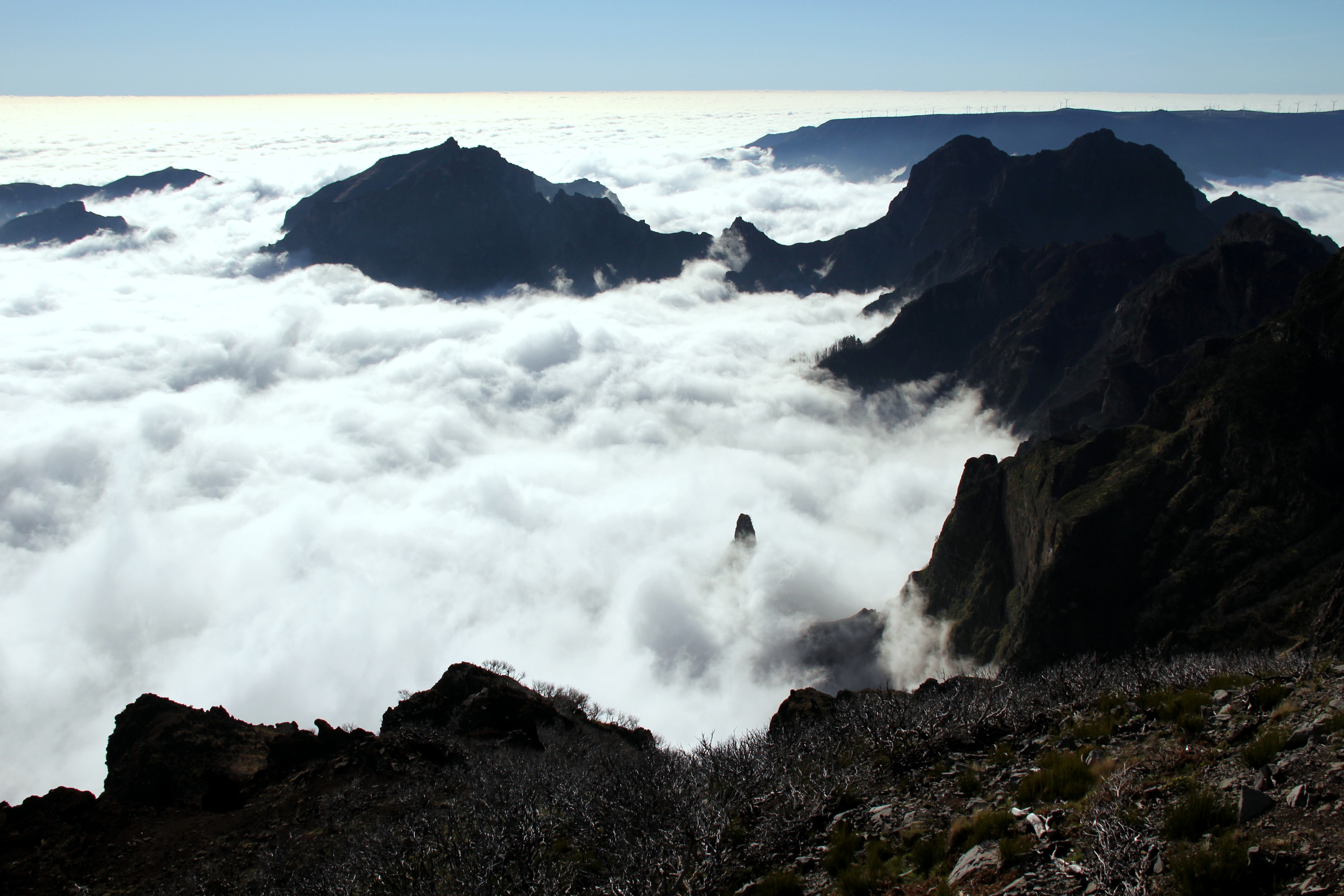 A Caminho do Pico Ruivo This is a photography of a Site of Community Importance in Portugal with the ID: PTMAD0002. Natura2000 entry, EEA entry